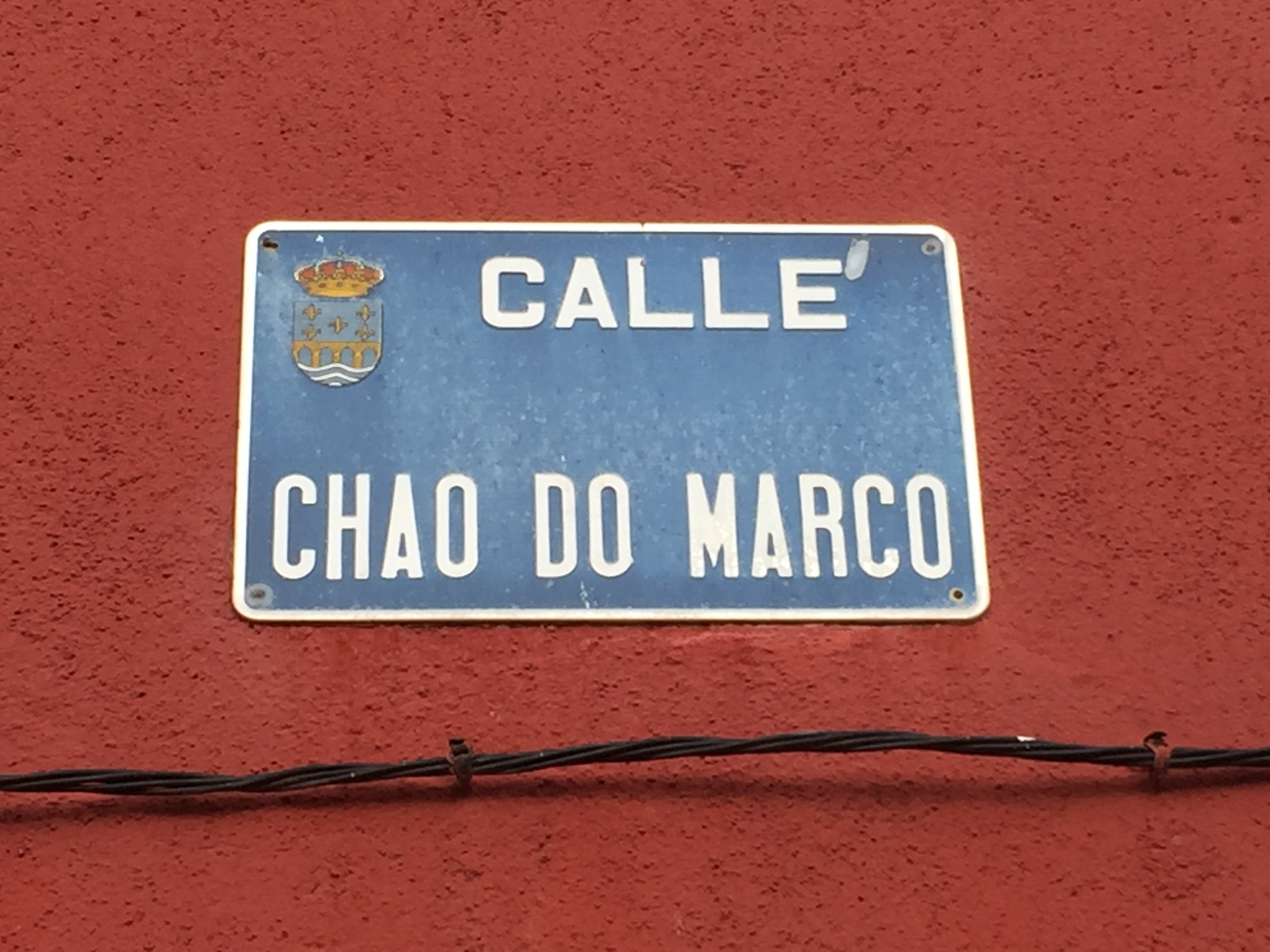 Malia que progresivamente castelanizada, a Galicia estremeira segue mantendo testemuños da súa lingua propia en hodónimos como o desta rúa da Ponte de Domingos Flórez.